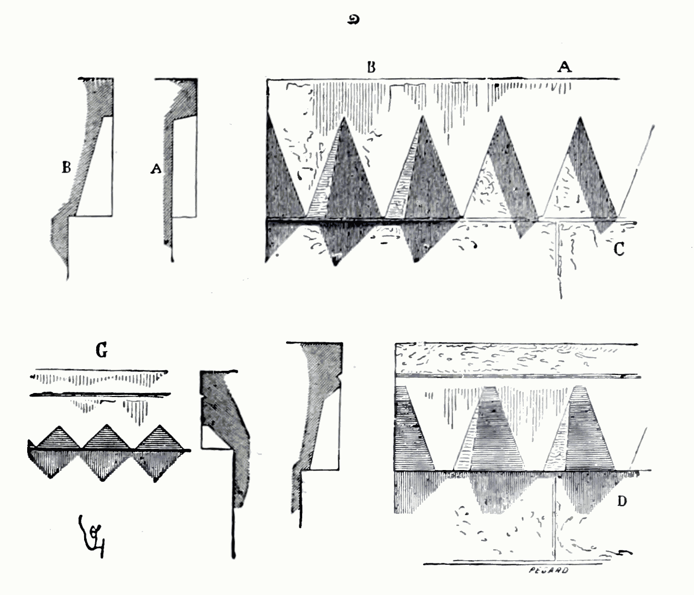 Sculptures en dents-de-scie, XIIe siècle